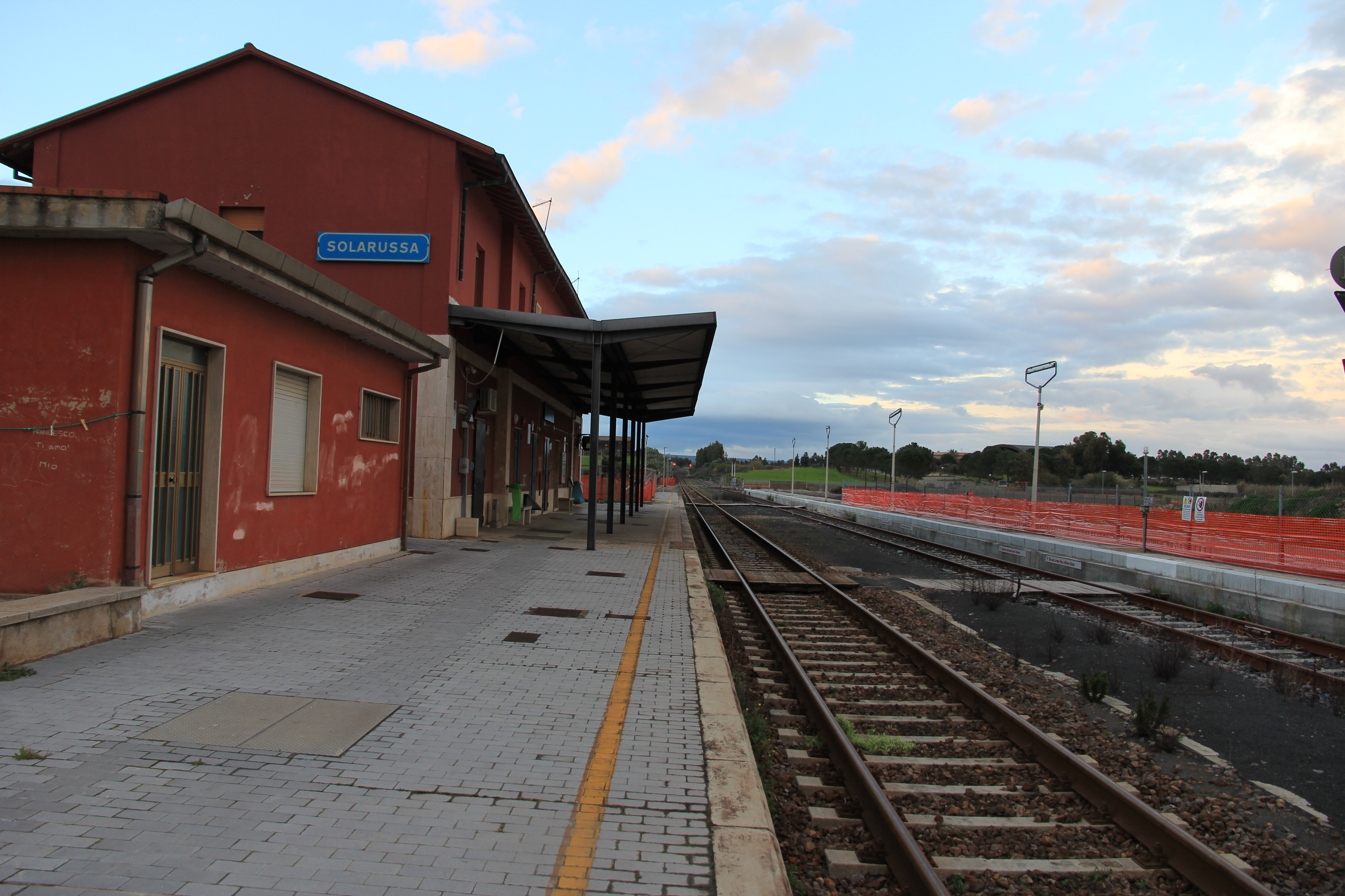 Stazione ferroviaria di Solarussa